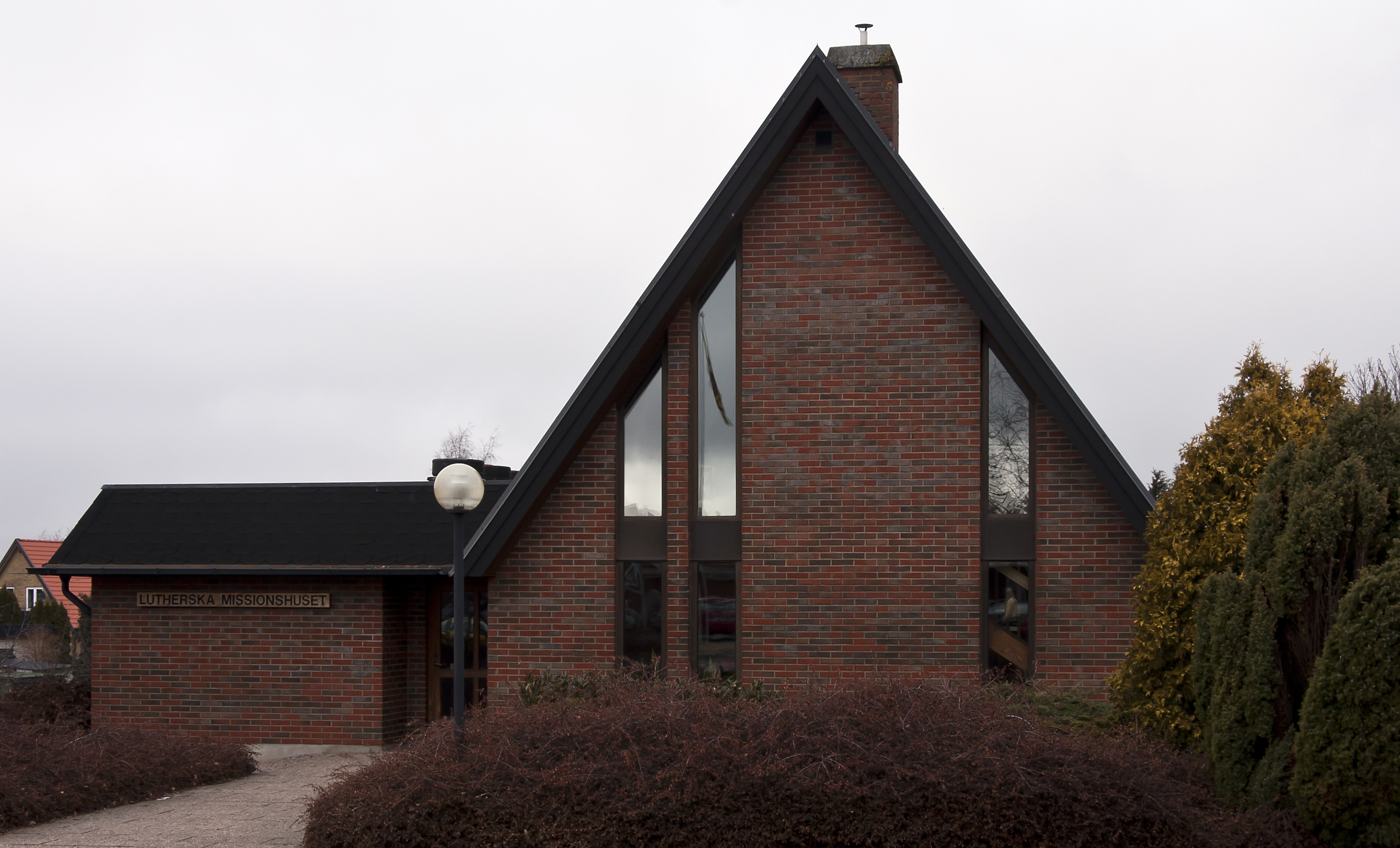 Lutherska missionshuset i Åstorp, möteslokal för ELM (Evangelisk-Luthersk Mission).